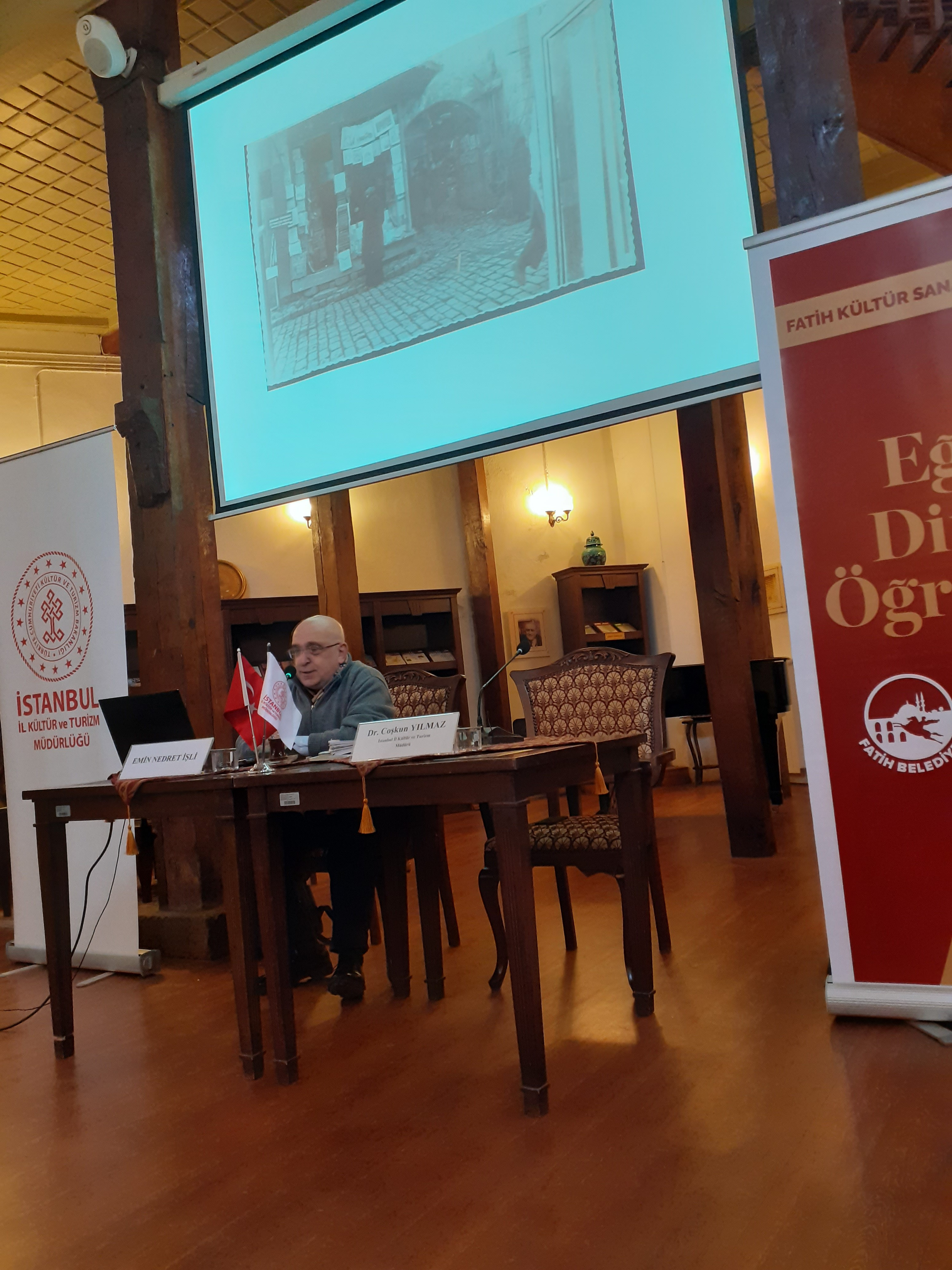 Emin Nedret İşli Bâbıâli Konuşmaları'nda.